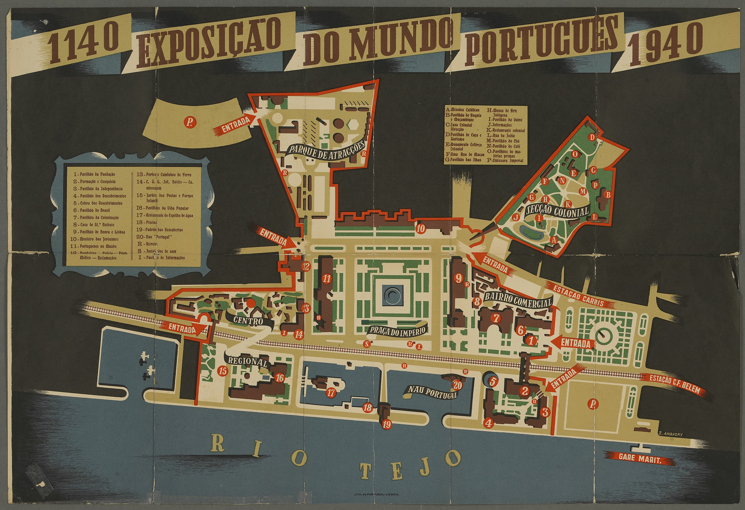 Plan de l'exposition du monde portugais, 1940, Lisbonne